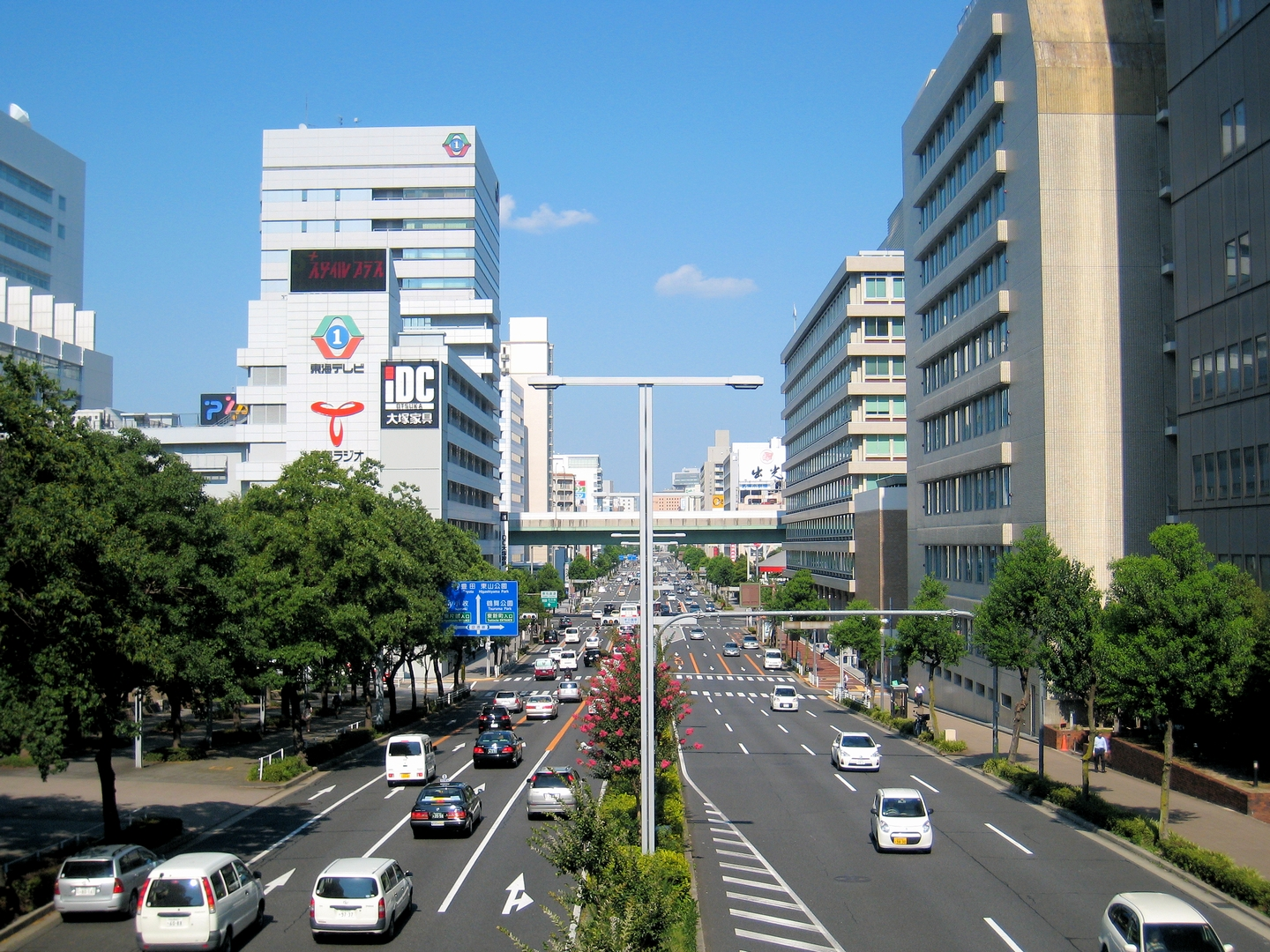 名古屋錦通（東新町北交差点方面）